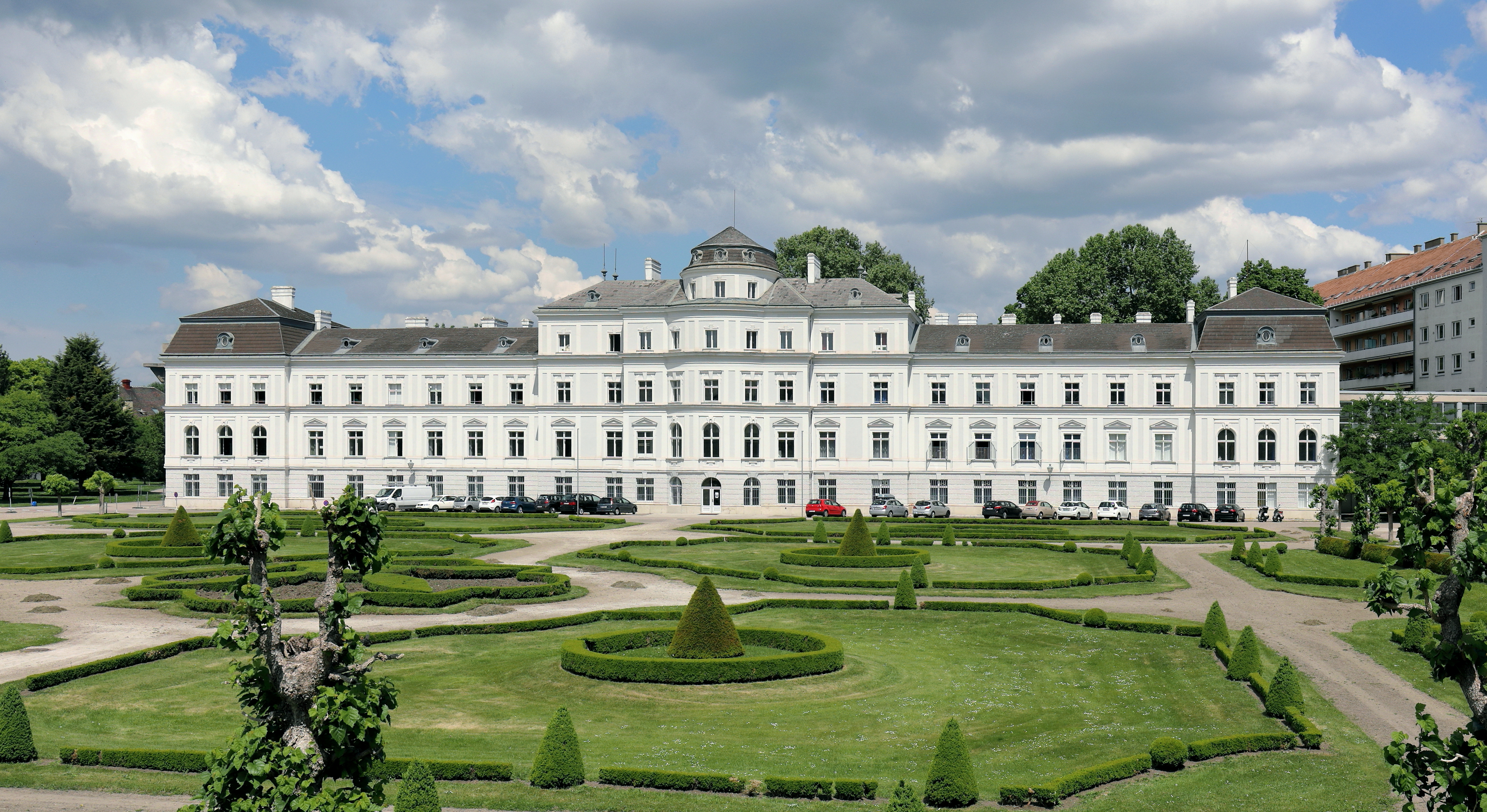 Das Palais Augarten im 2. Wiener Gemeindebezirk Leopoldstadt.Das Palais wurde ursprünglich Ende des 17. Jahrhunderts als Gartenpalais durch Johann Bernhard Fischer von Erlach für den Ratsherrn Zacharias Leeb errichtet. 1897 wurde das Palais aufgestockt sowie vergrößert und von Erzherzog Otto mit Gattin Maria Josefa und den Söhnen Max und Karl (ab 1916 Kaiser Karl I.) bewohnt. 1948 bezogen die Wiener Sängerknaben das nach Kriegsschäden wiederinstandgesetzte Palais als neues Heim.